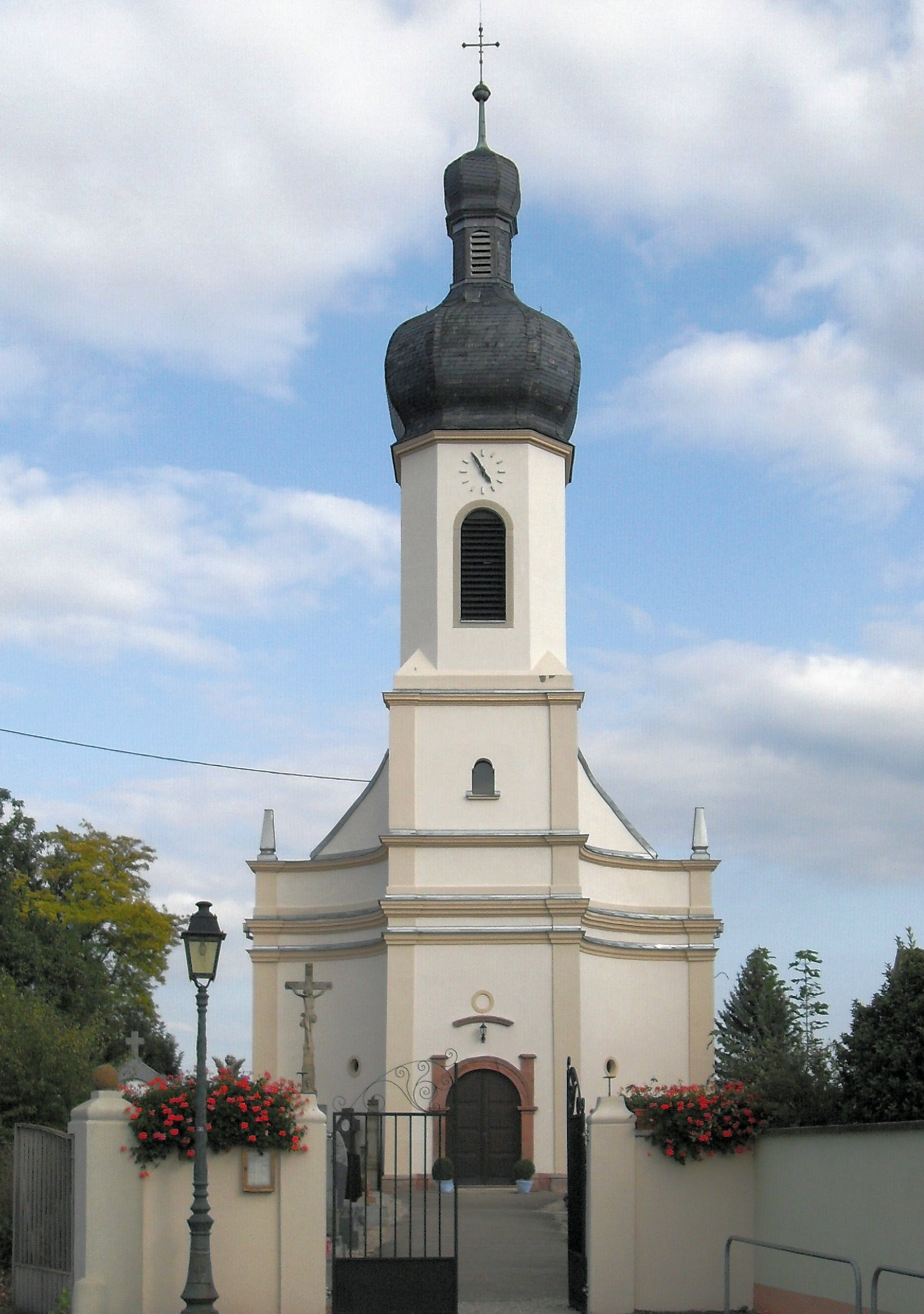 L'église de l'Exaltation de la Sainte-Croix à Grussenheim